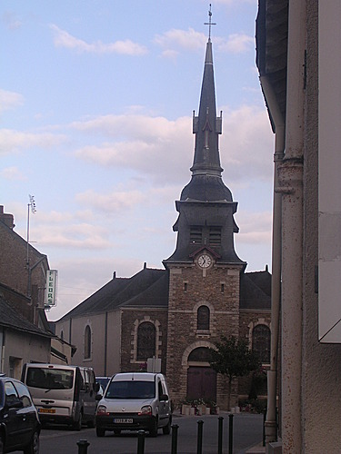 Eglise de ligné en Loire Atlantique